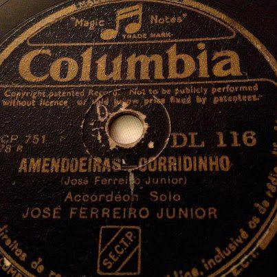 Esta imagem do disco de José Ferreiro Júnior, destina-se à sua página da wikipedia e é para fundamentar o texto do mesmo.